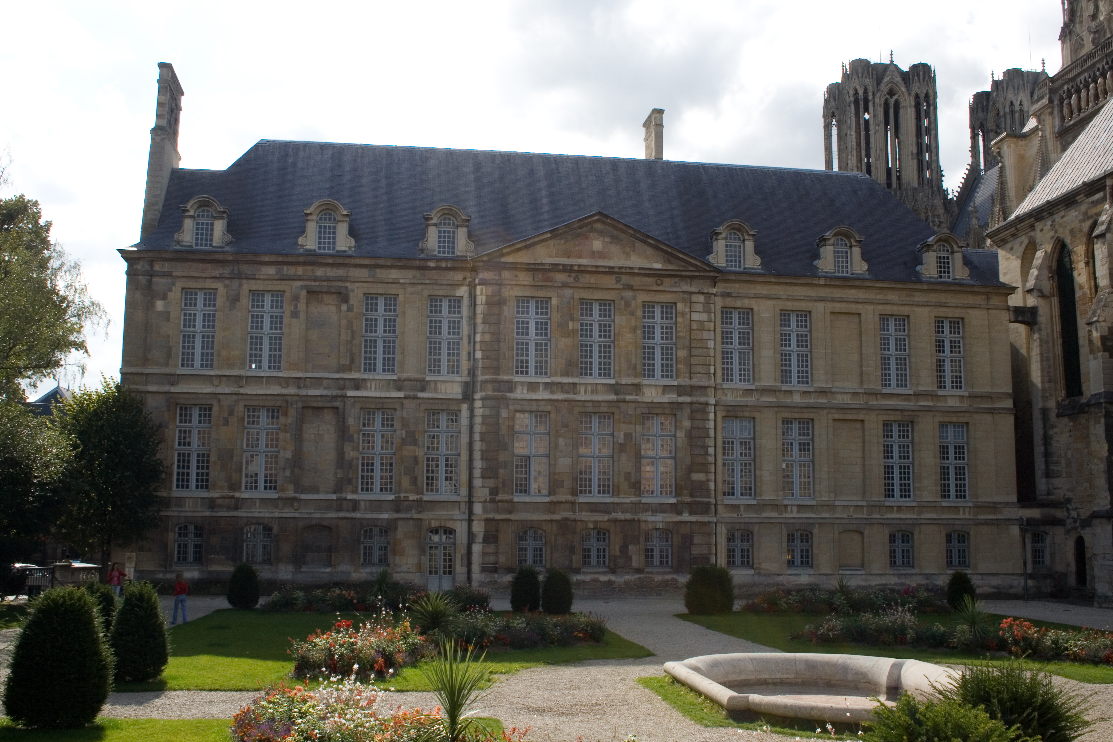 Palais du Tau, Reims